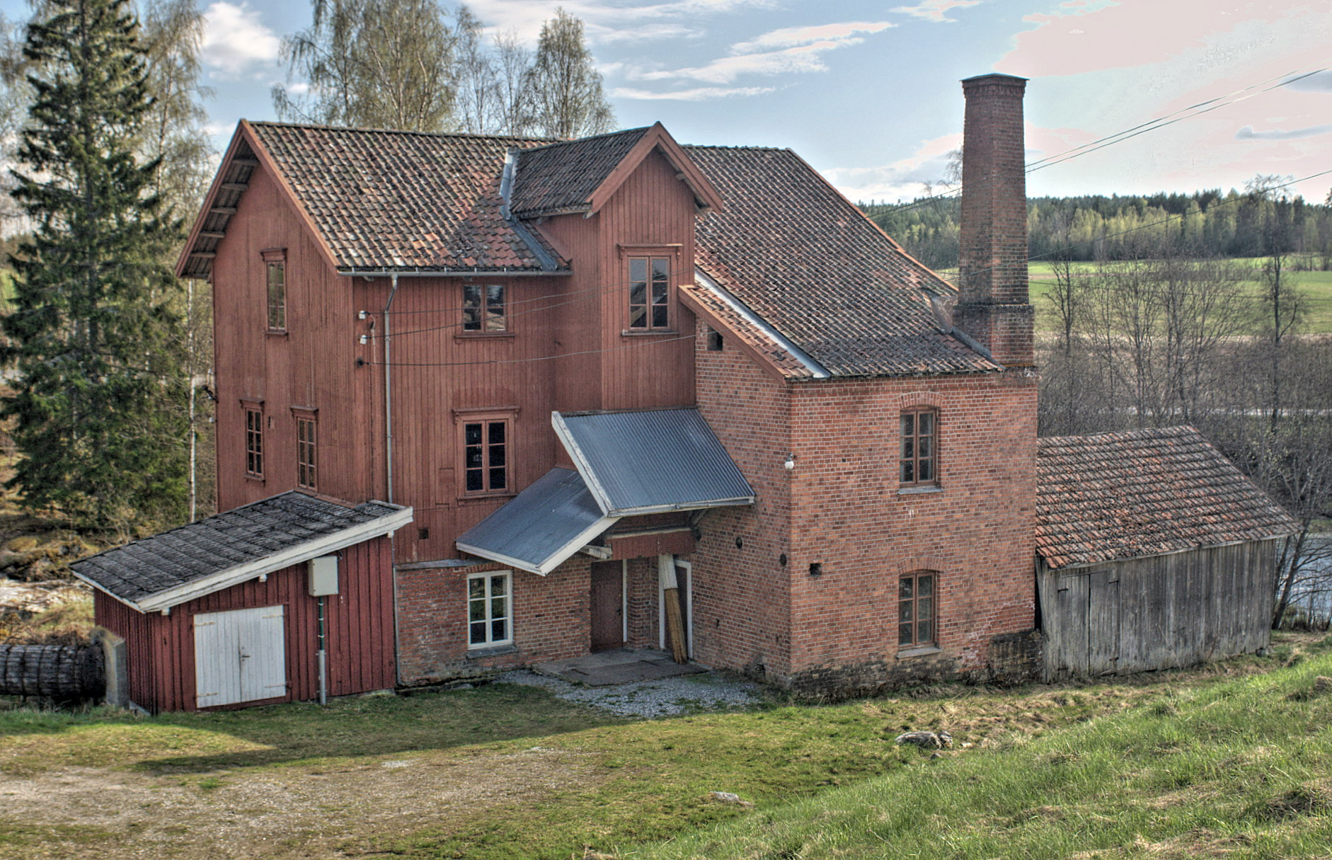 Auli Mølle i Nes